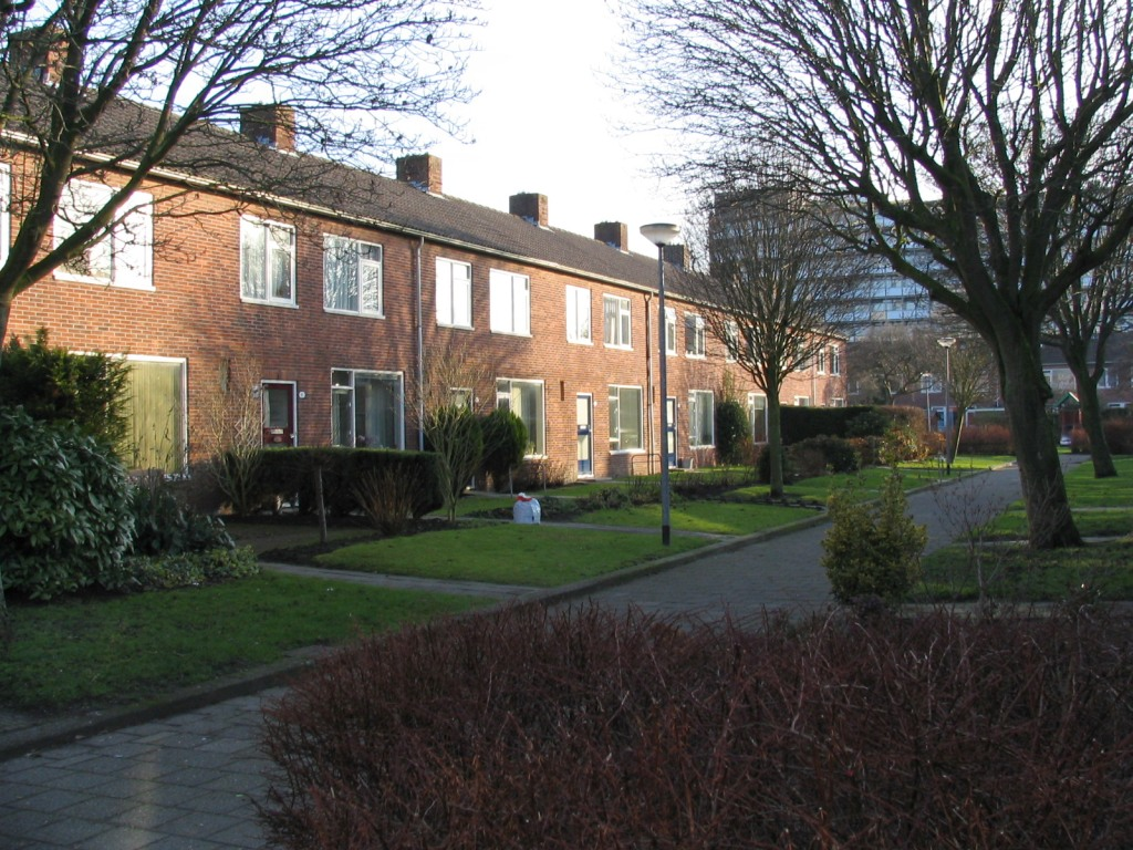 Een stukje van de Prunusstraat in de wijk Selwerd, Groningen (stad).